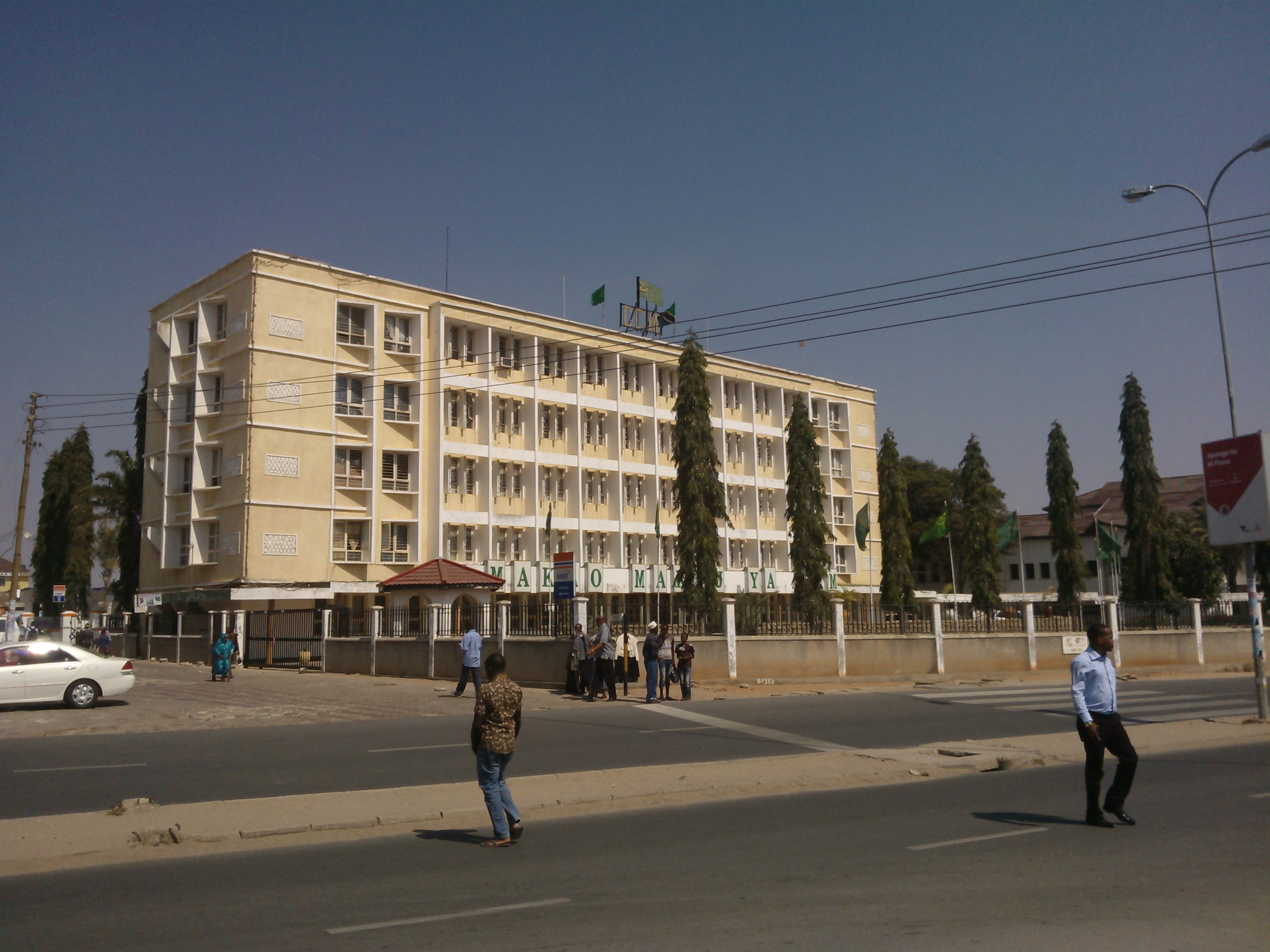 Facciata dell'edificio che ospita la sede nazionale del Partito della Rivoluzione a Dodoma, capitale della Tanzania